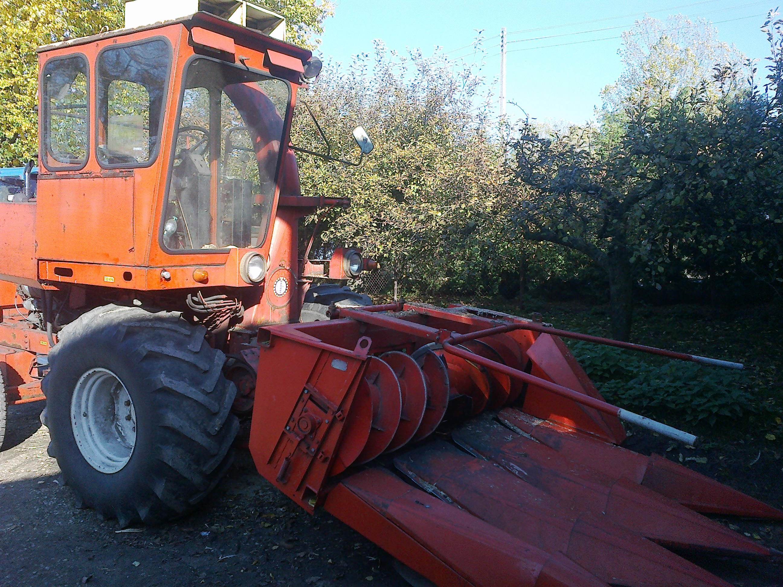 Sieczkarnia Z350/3 i Z344 - przystawka